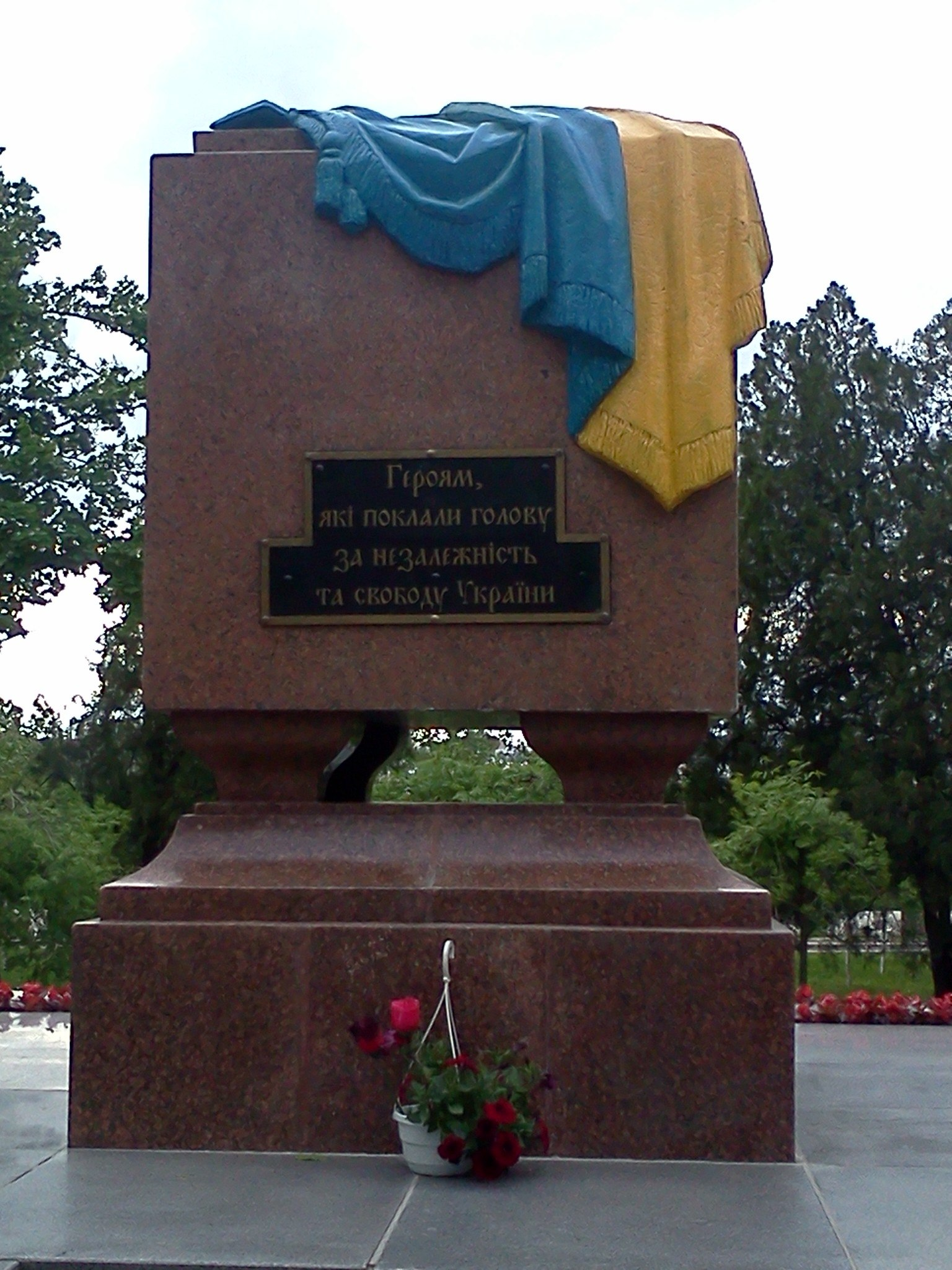 Вічний вогонь "Героям, які поклали голову за незалежність та свободу України".